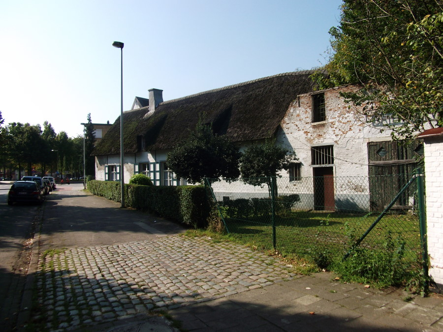 De Catershoeve te Merksem